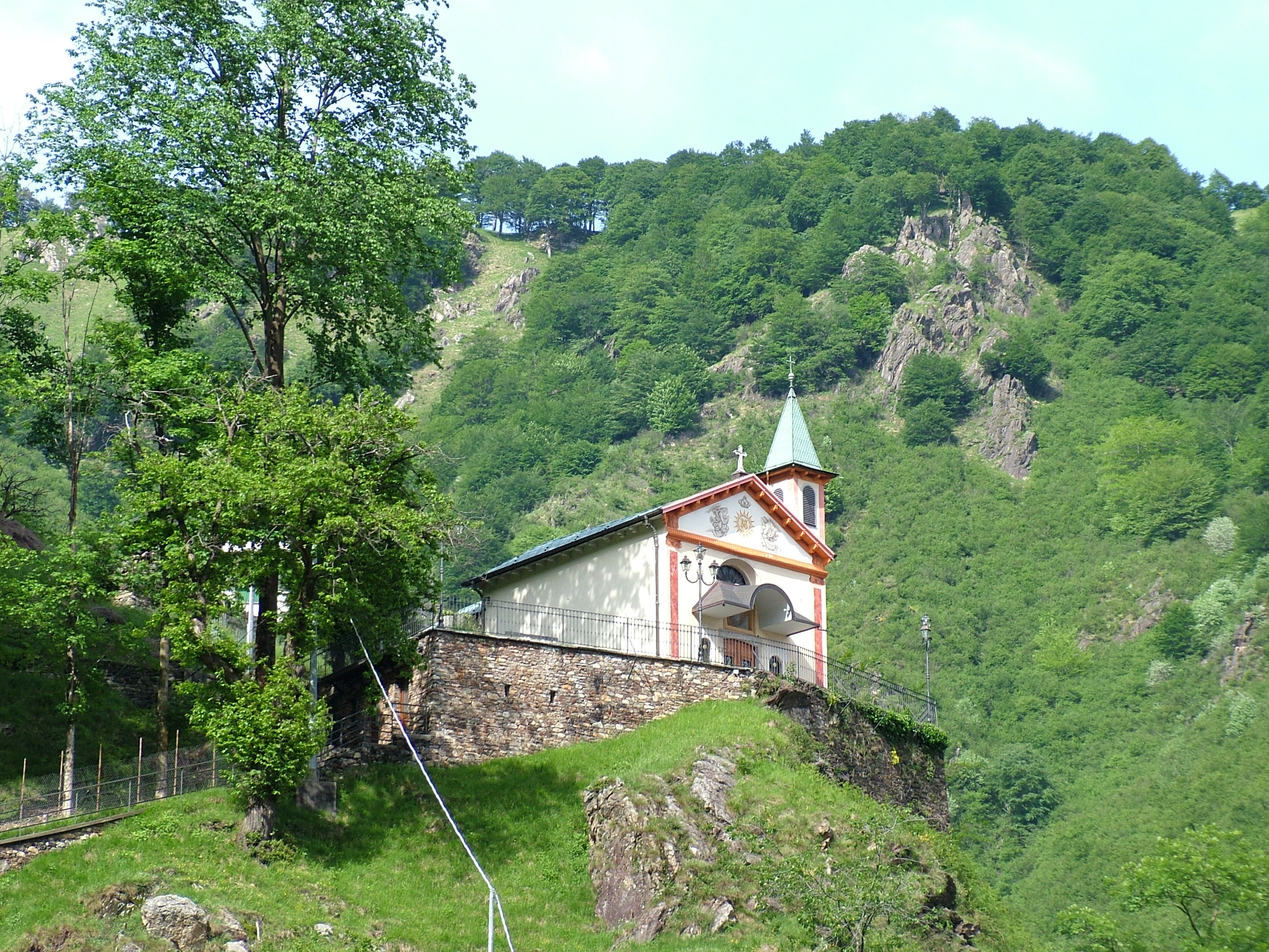 la chiesetta veglia il paese di luzzogno da secoli,posta su quel colle che domina il paese e la valle strona,ma che nello stesso tempo protegge amorevole i suoi abitanti